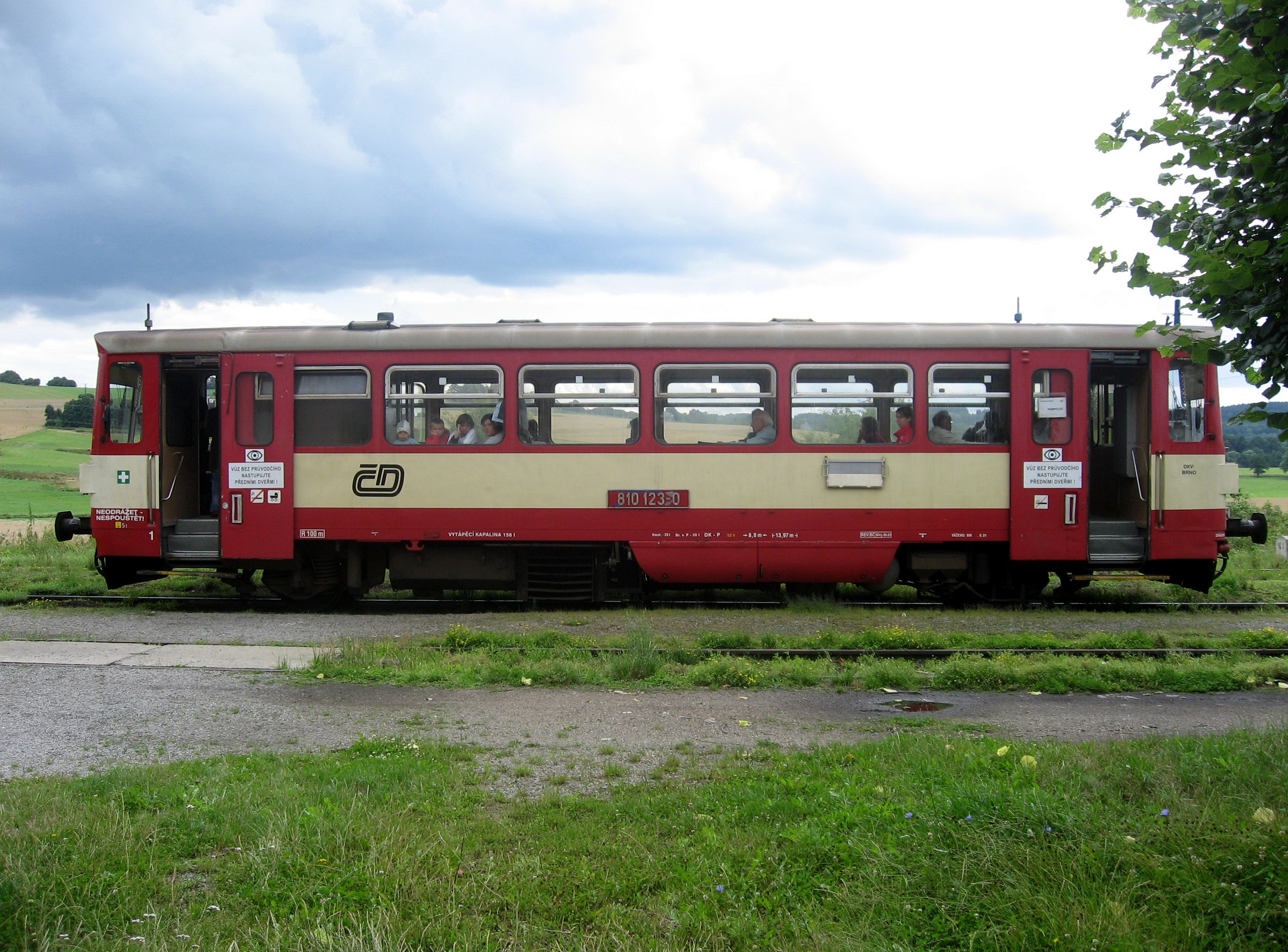 Motorový vůz v Herálci